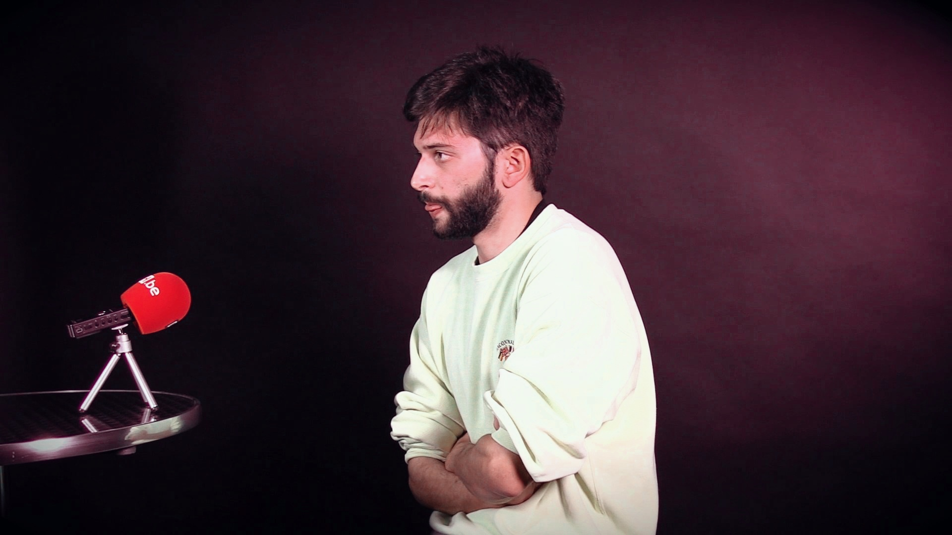 Lucas Spampinato 2016